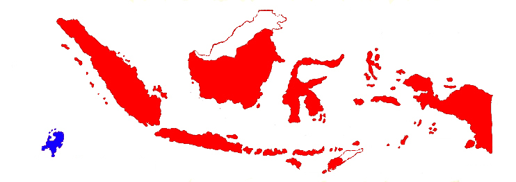 Nederlando (blue) kaj Indonezio (ruĝe, kun Okcidenta Nov-Gvineo dekstre) en area komparo